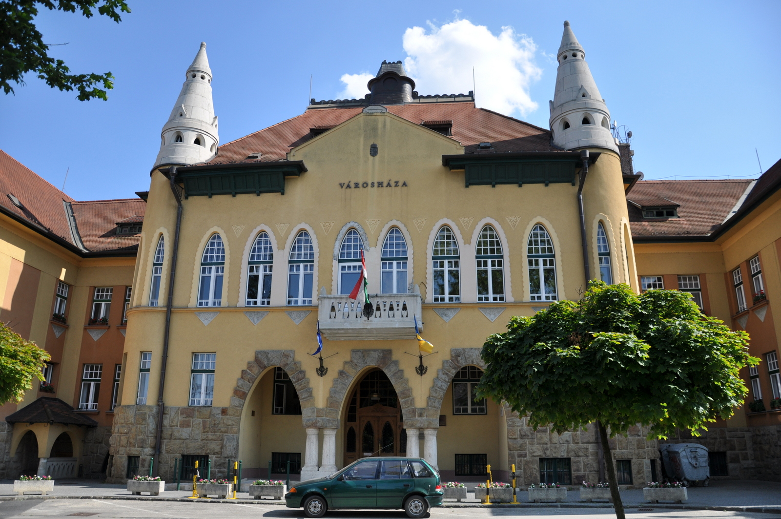 Town Hall in Budafok, Budapest District XXII